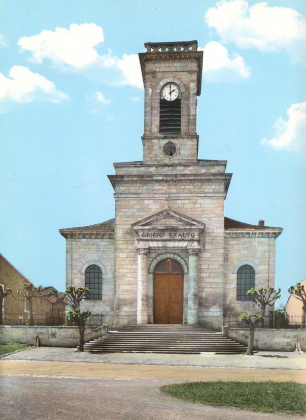 L'église